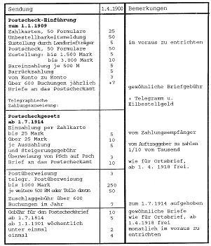 Gebühren im Postscheckdienst ab 1909